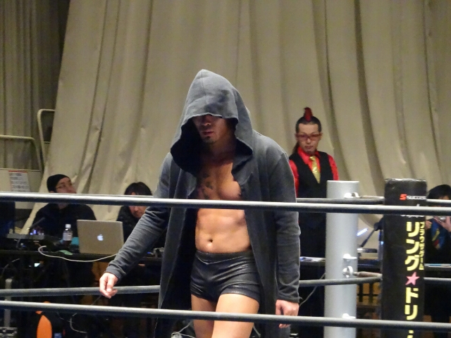 2月23日後楽園ホール大会より